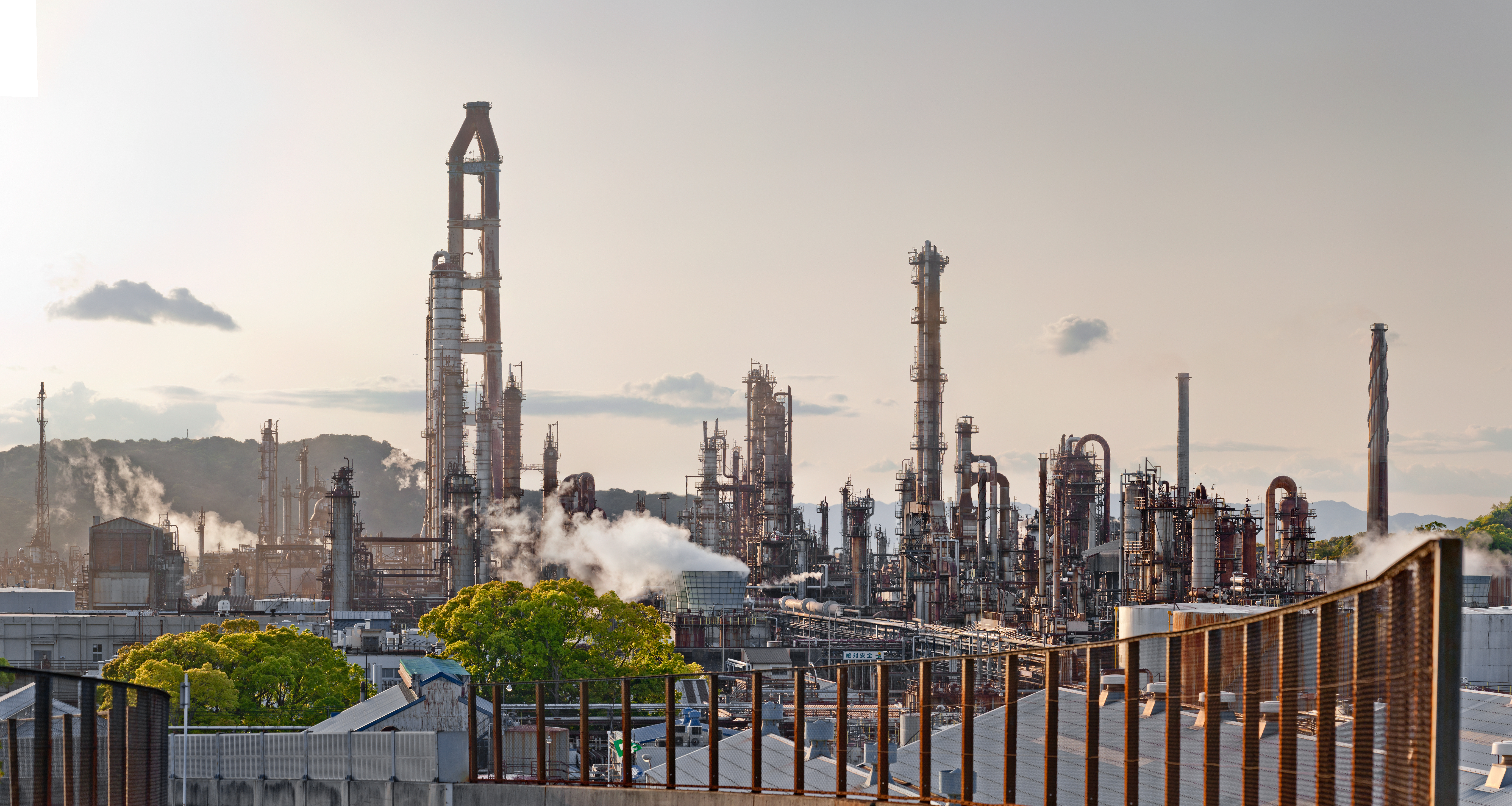 JXTGエネルギー和歌山製油所